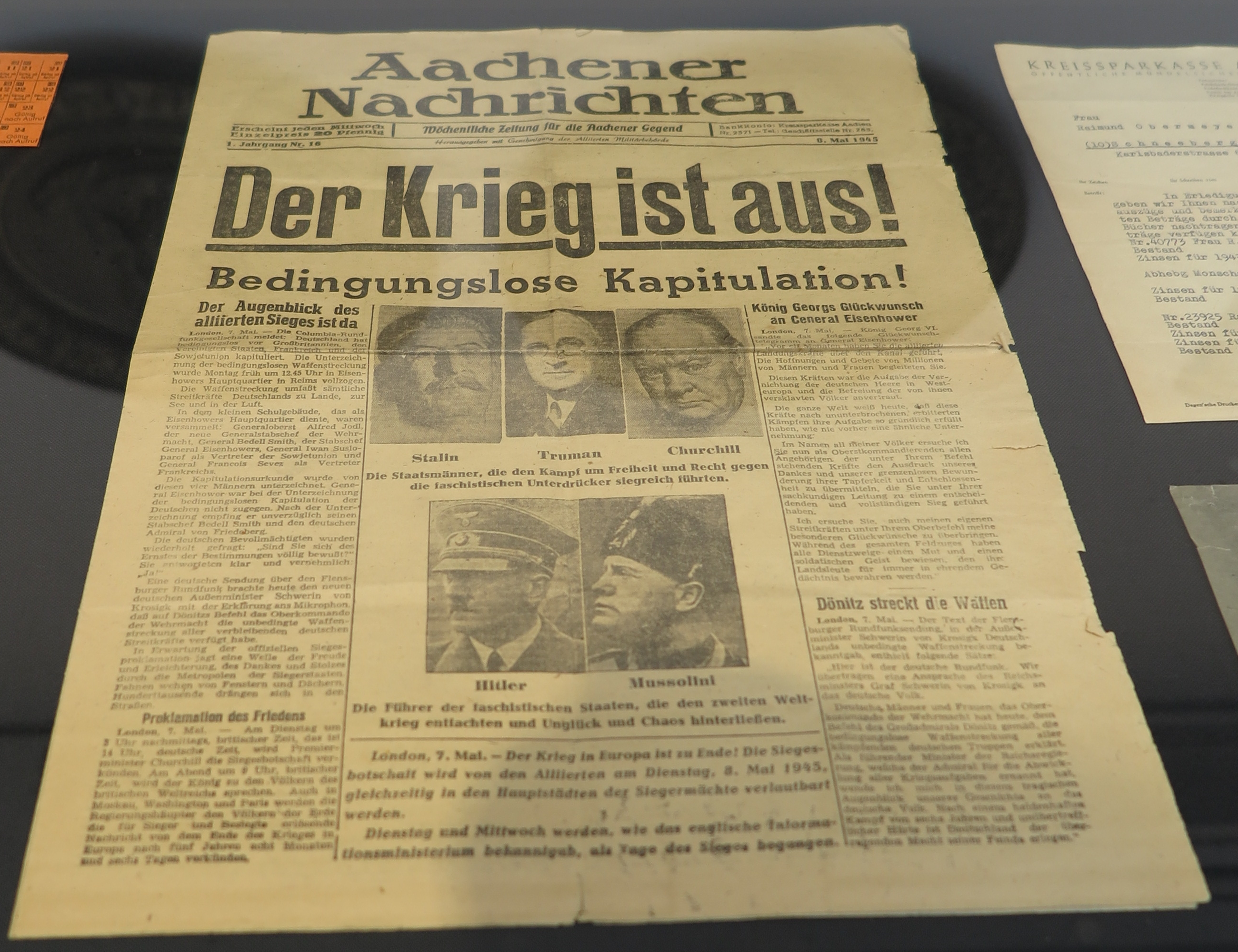 Ausgabe der Aachener Nachrichten vom 8. Mai 1945 im neuen Aachener Stadtmuseum „Centre Charlemagne”. Als erstes freies Blatt - ohne Nazi-Propaganda - konnten die Aachener Nachrichten bedingungslose Kapitulation der Wehrmacht am 8. Mai 1945 vermelden. Sie war damit eine von zwei Zeitungen Deutschlands die an diesem Tag davon berichteten. Die andere Zeitung war die Flensburger Nachrichten aus Flensburg, wo sich die letzte Reichsregierung befand.